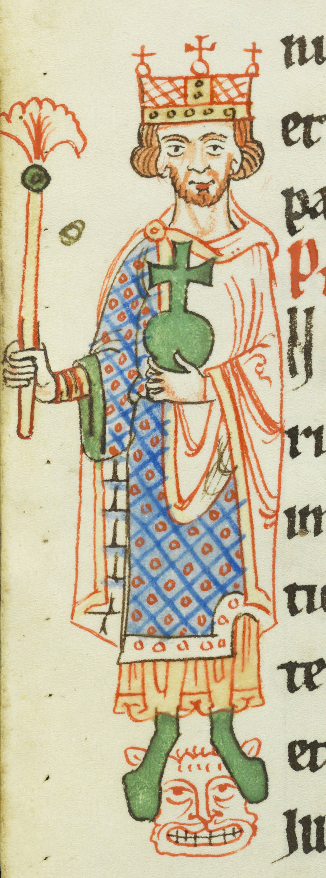 Acta Sancti Petri in Augia; St. Gallen, Kantonsbibliothek, Vadianische Sammlung, VadSlg Ms. 321, S. 34, Kaiser Friedrich I. Barbarossa